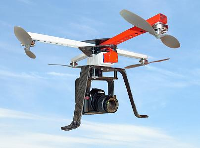 Moderner Flugroboter der Firma Innovative Sights mit Spiegelreflexkamera